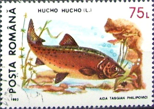 Source: Post of Romania